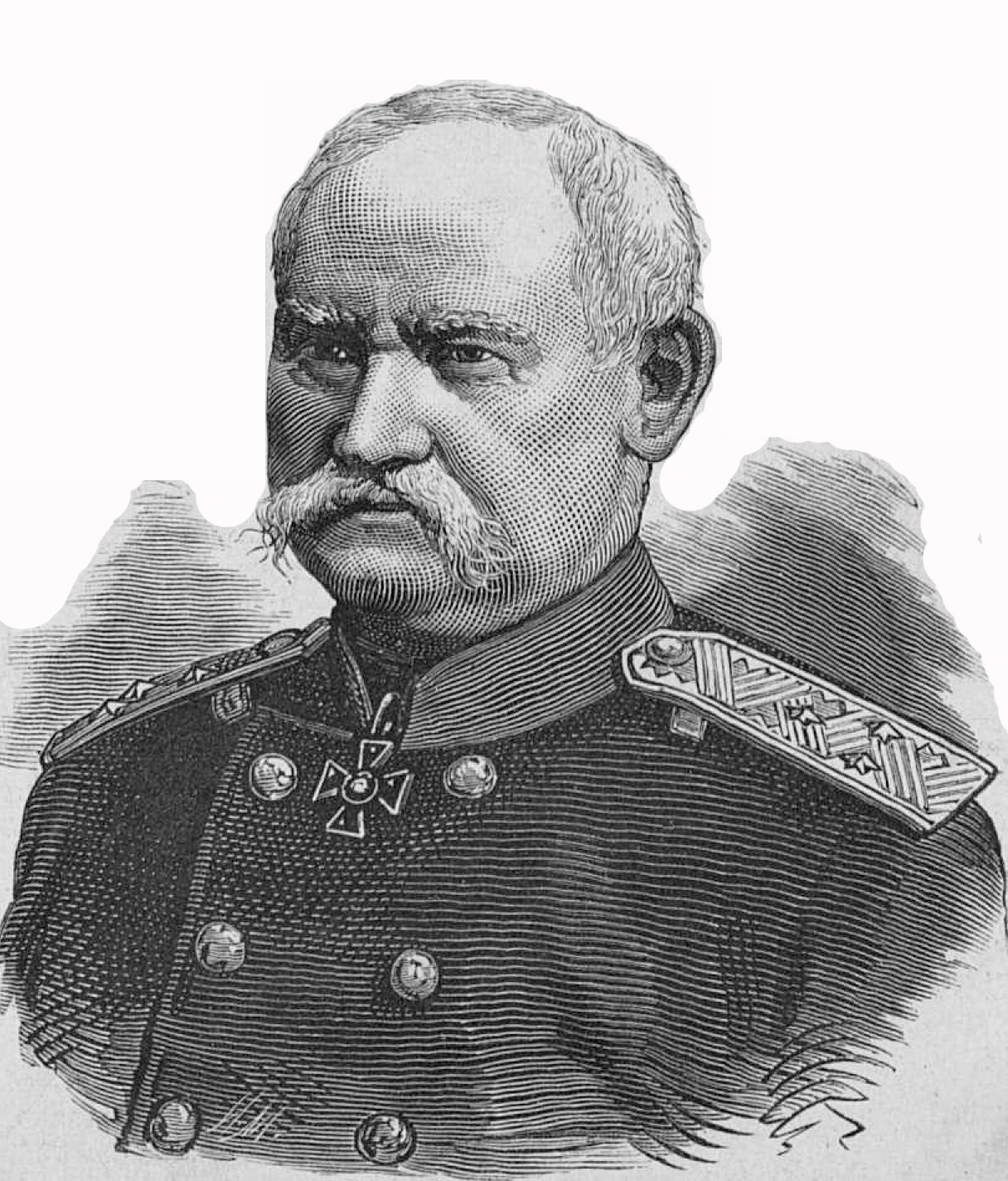 Генерал Шильдер-Шульднер Юрий Иванович, 1877 год